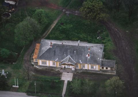 Balázsovich-kúria, Pusztamonostor, Hungary, aerialphotography